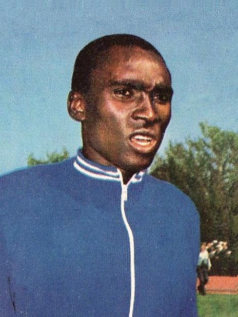 CAMPIONI dello SPORT 1973/74-Figurina n.6- AKII-BUA - UGANDA -ATL.LEGGERA